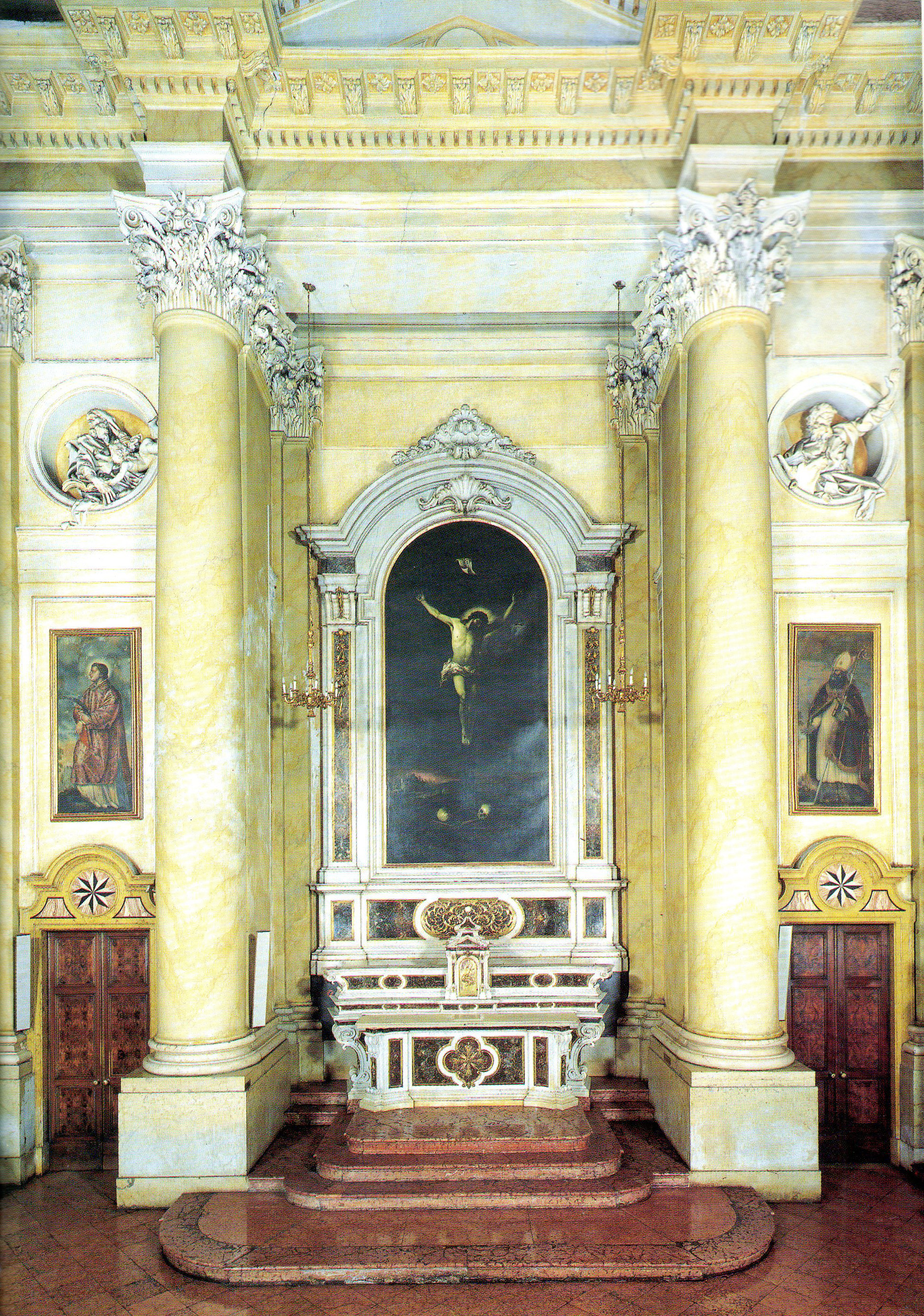 San_lorenzo_brescia_cappella_crocifisso.jpg